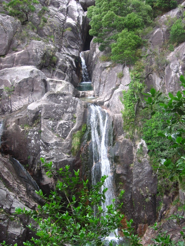 Uma das cascata no Rio Arado - Serra do Gerês, Portugal